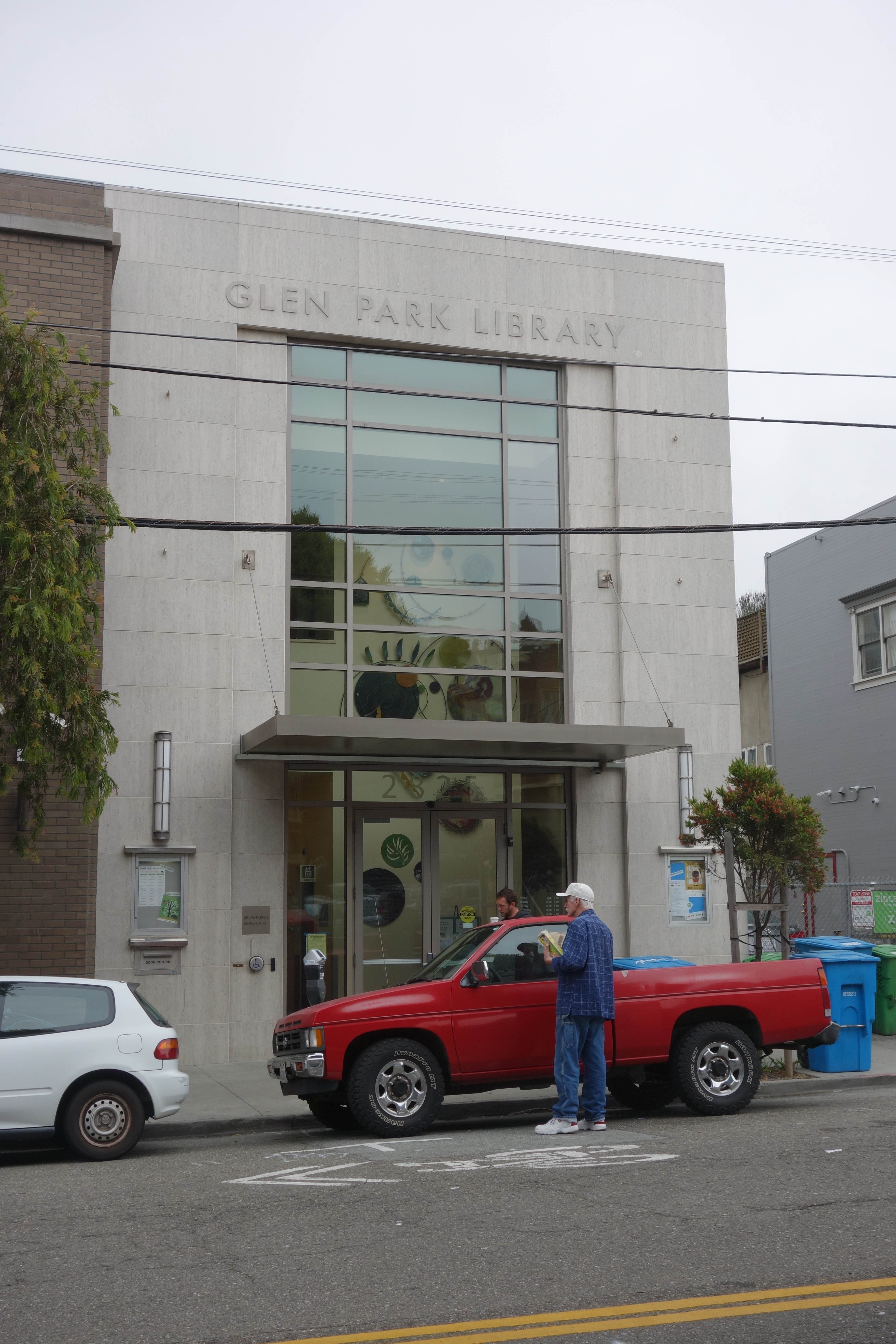 Glen Park Branch Library